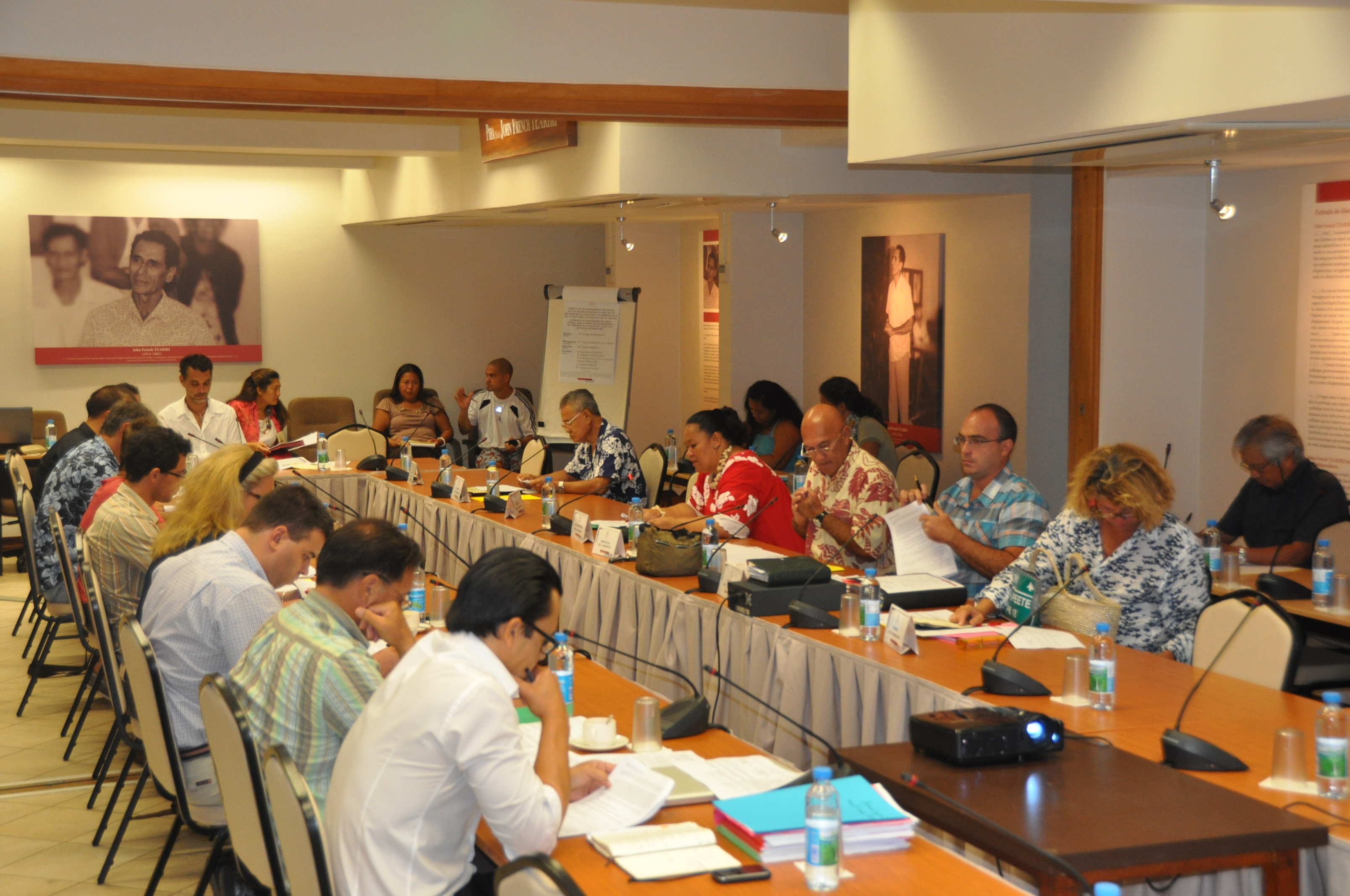 Les représentants en salle de commission